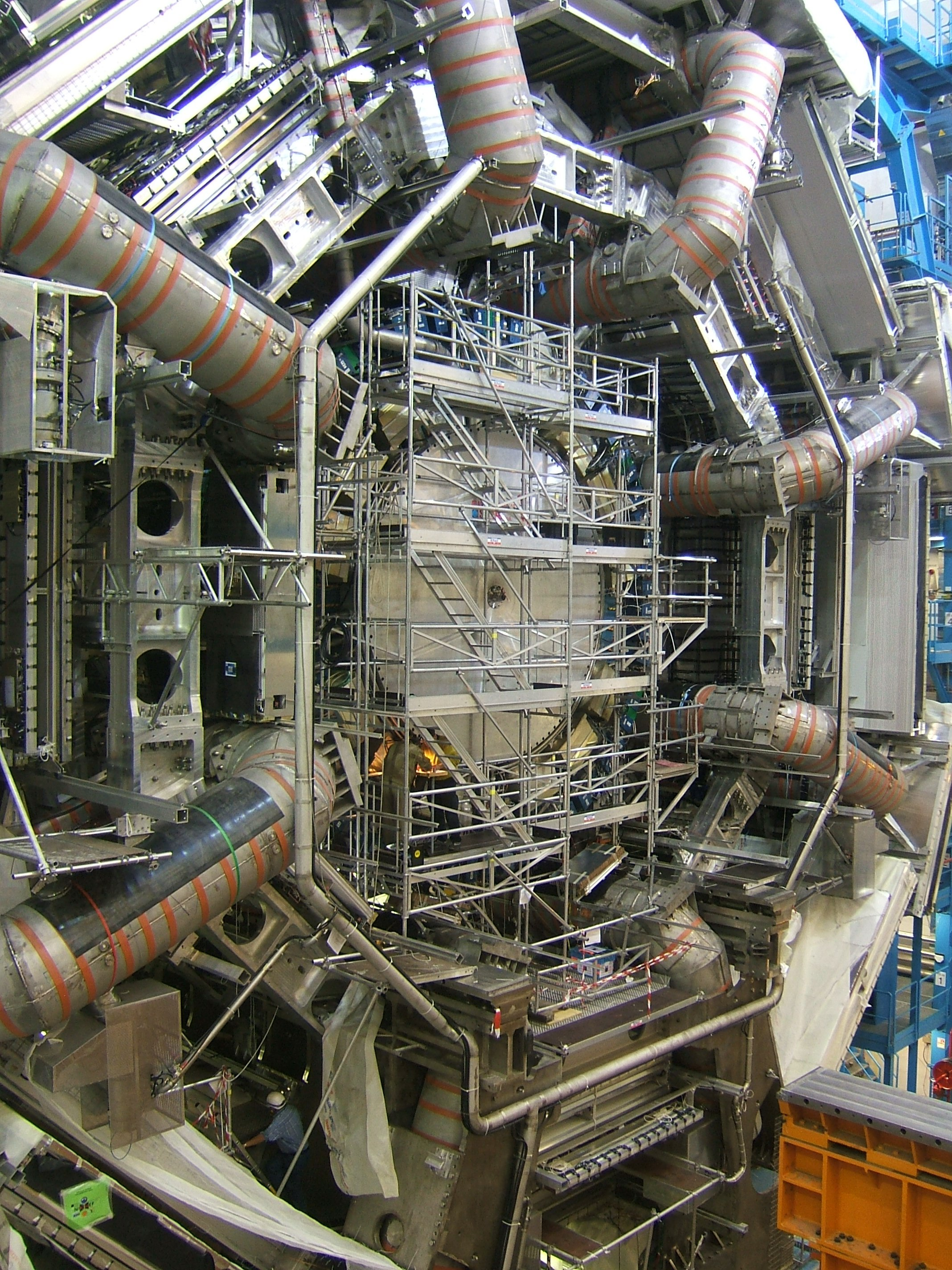 EN: The ATLAS detector under construction (November 2006) FR : Le détecteur ATLAS en phase de construction (Novembre 2006).